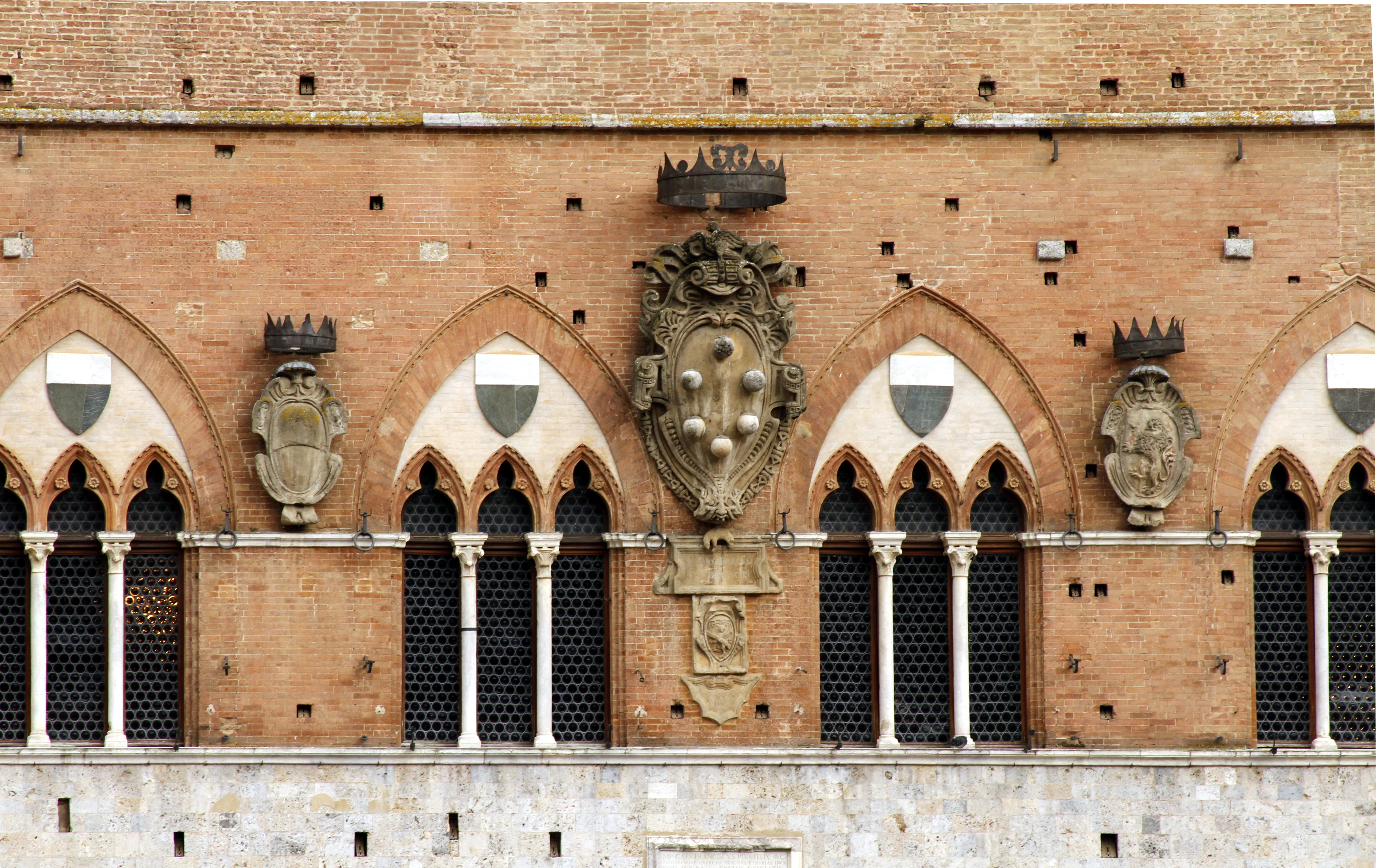 Piazza del Campo - Siena